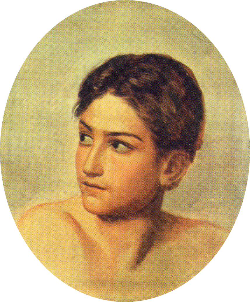 А А Иванов, эскиз фигуры дрожащего сына - И. М. Виельгорский (1817-1839)